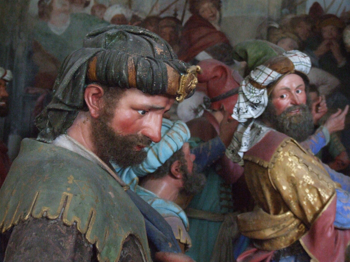 Chapel 35 - Christ condemned to death Sacro Monte di Varallo Native nameSacro Monte di VaralloLocationVarallo Sesia, Piedmont, ItalyCoordinates45° 49′ 10.95″ N, 8° 15′ 19.01″ E WebsiteSacro Monte di Varallo - Polychrome clay statues by Giovanni d'Enrico and frescos